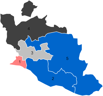 Résultats des élections législatives du Vaucluse en 2012